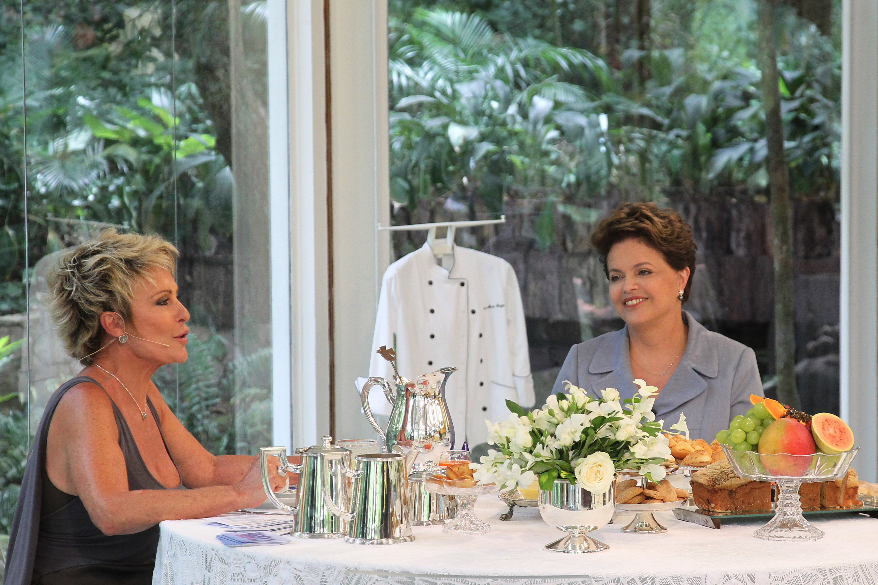 Presidenta Dilma Rousseff conversa com a apresentadora Ana Maria Braga no programa Mais Você (Rio de Janeiro, RJ, 01/03/2011) Foto: Roberto Stuckert Filho/PR